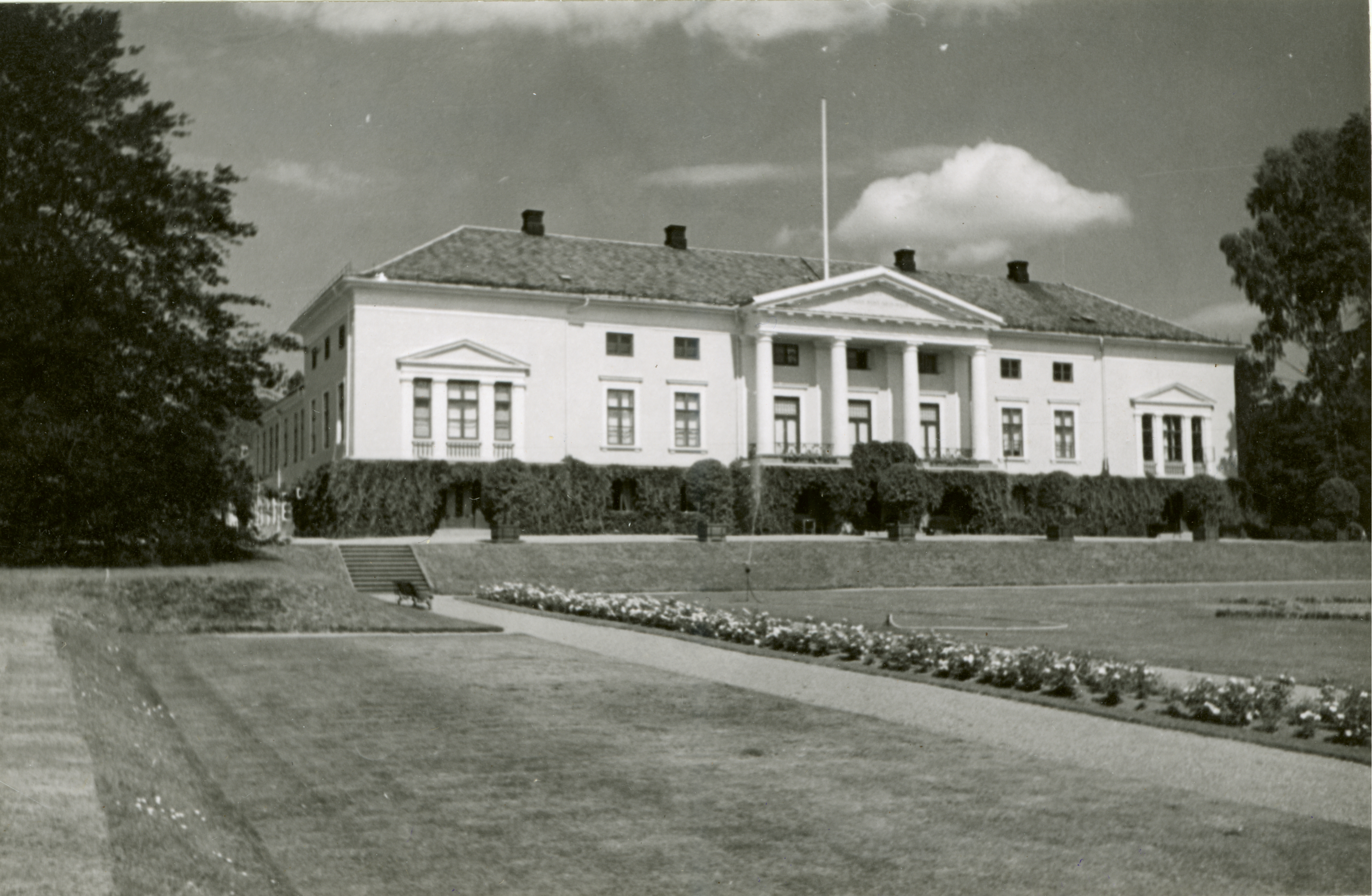 Fossum Nordre i Gjerpen, Telemark Byggeår 1811. Arkitekter var Christian Frederik Hansen og Johan Gottfried Böydler. Fredet i 1924. Hagefasade. This image on crowdsourcing geotagging platform Fotodugnad